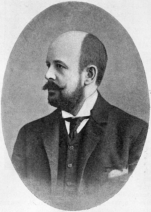 Извольский Пётр Петрович